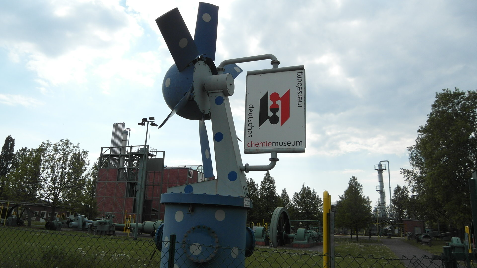 Deutsches Chemie-Museum Merseburg, Eingangsbereich (2014)